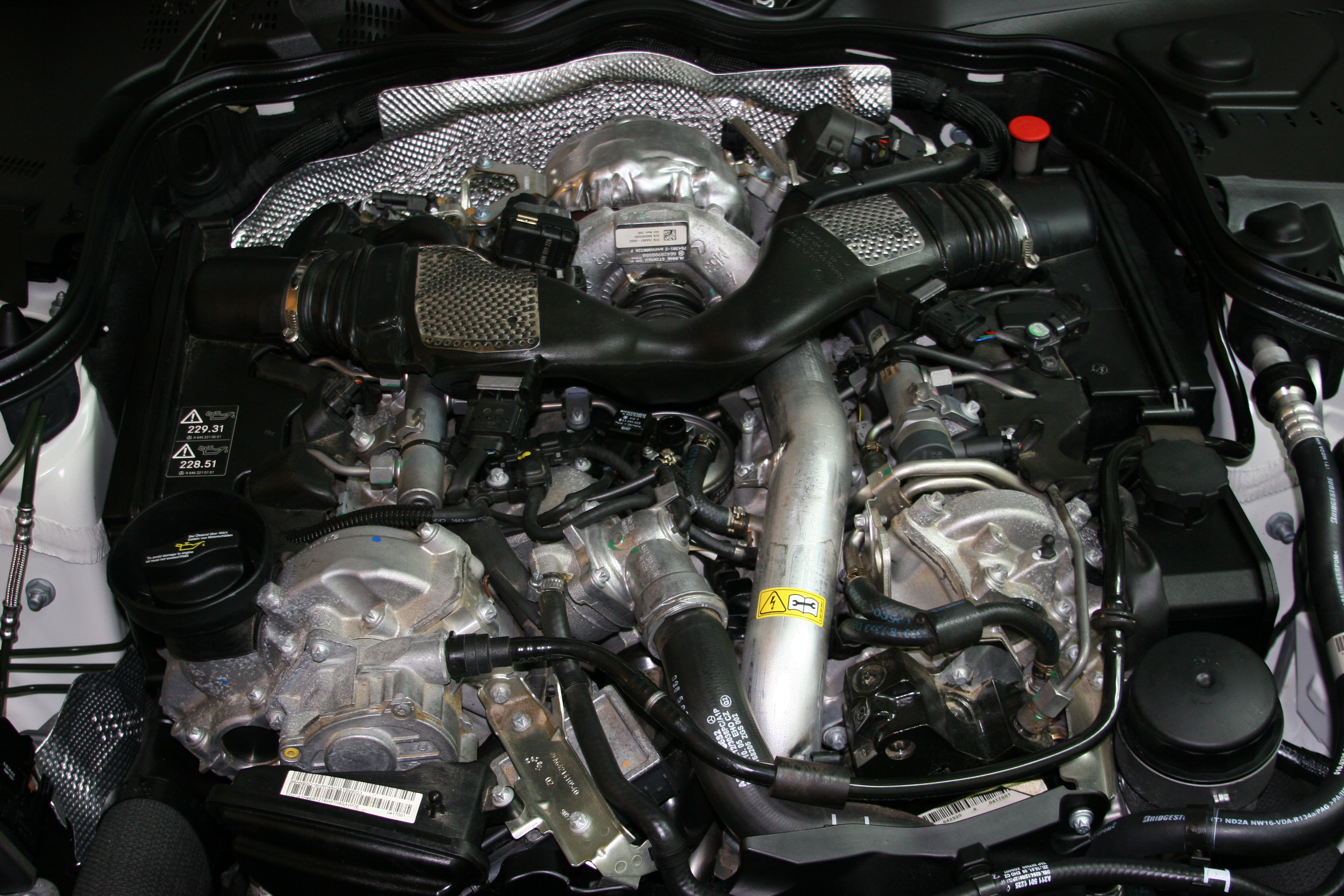 Mercedes-Benz Motor 642.920